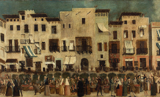 El mercado del Borne en el siglo XVIII.